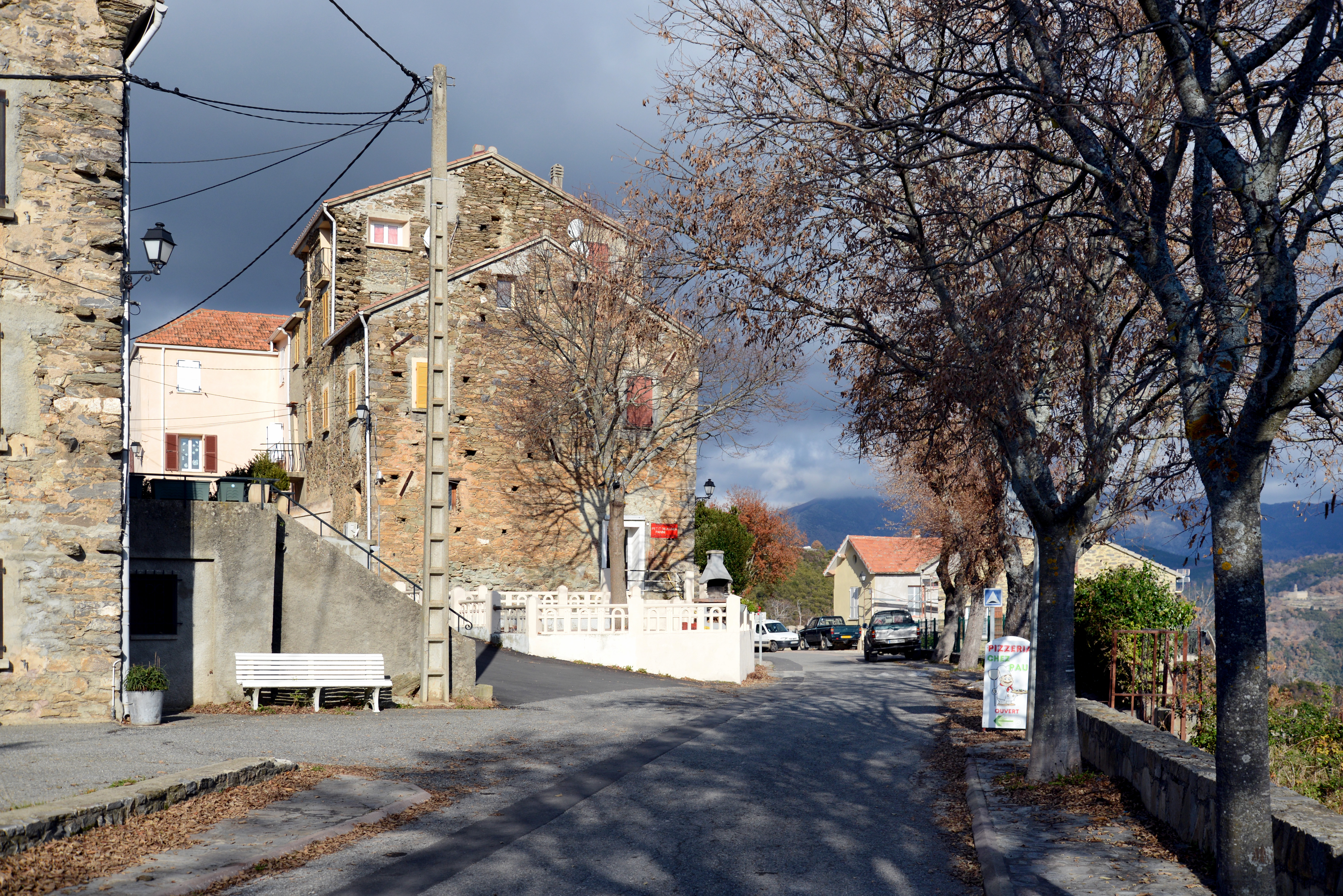 Pietraserena, Castagniccia (Haute-Corse) - Au centre du village